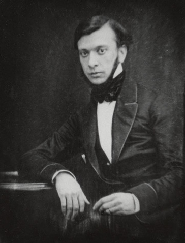 Александр Васильевич Сухово-Кобылин (1817—1903), драматург.